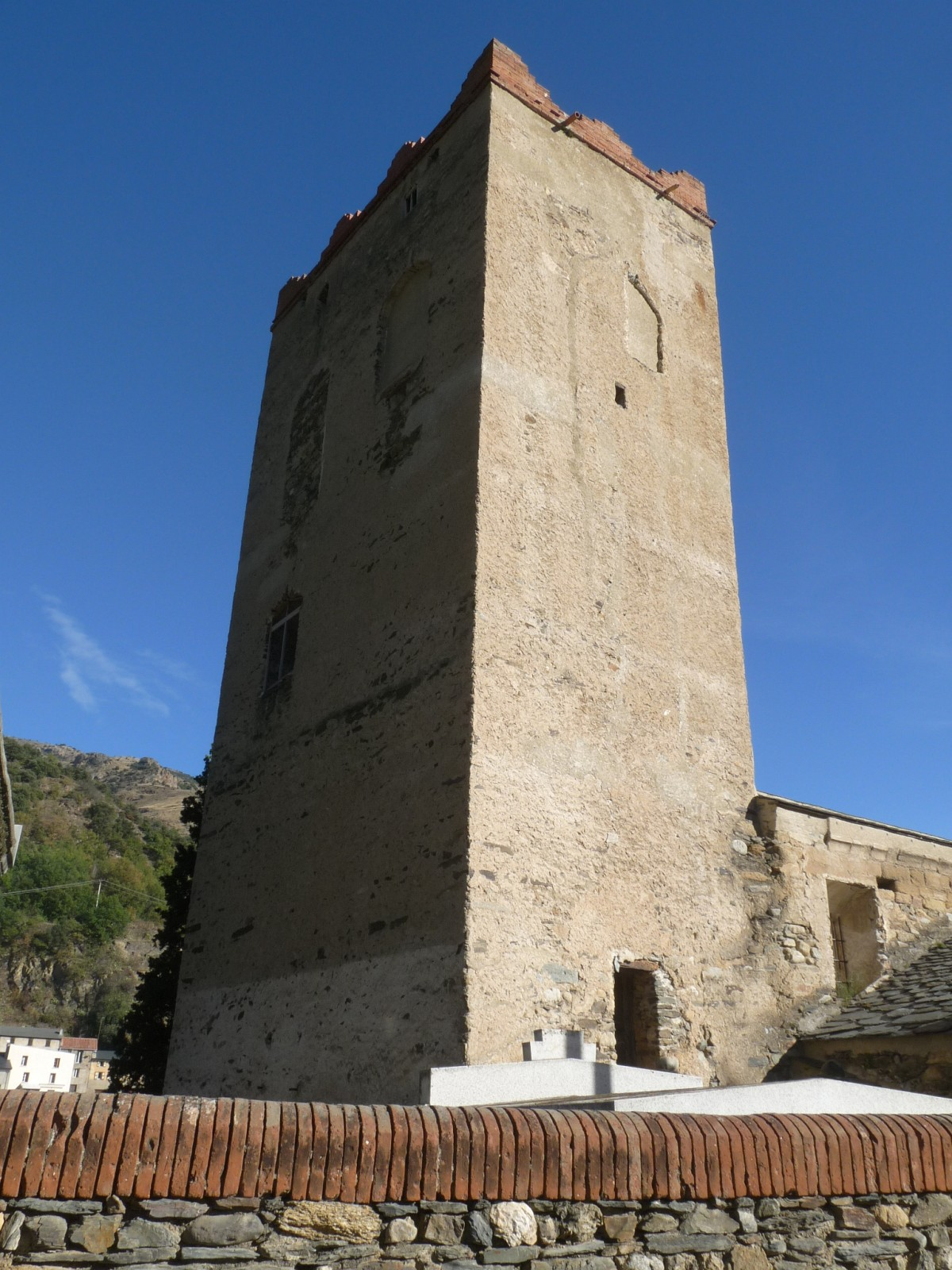 Eglise de Serdinya, Pyrénées-Orientales, France